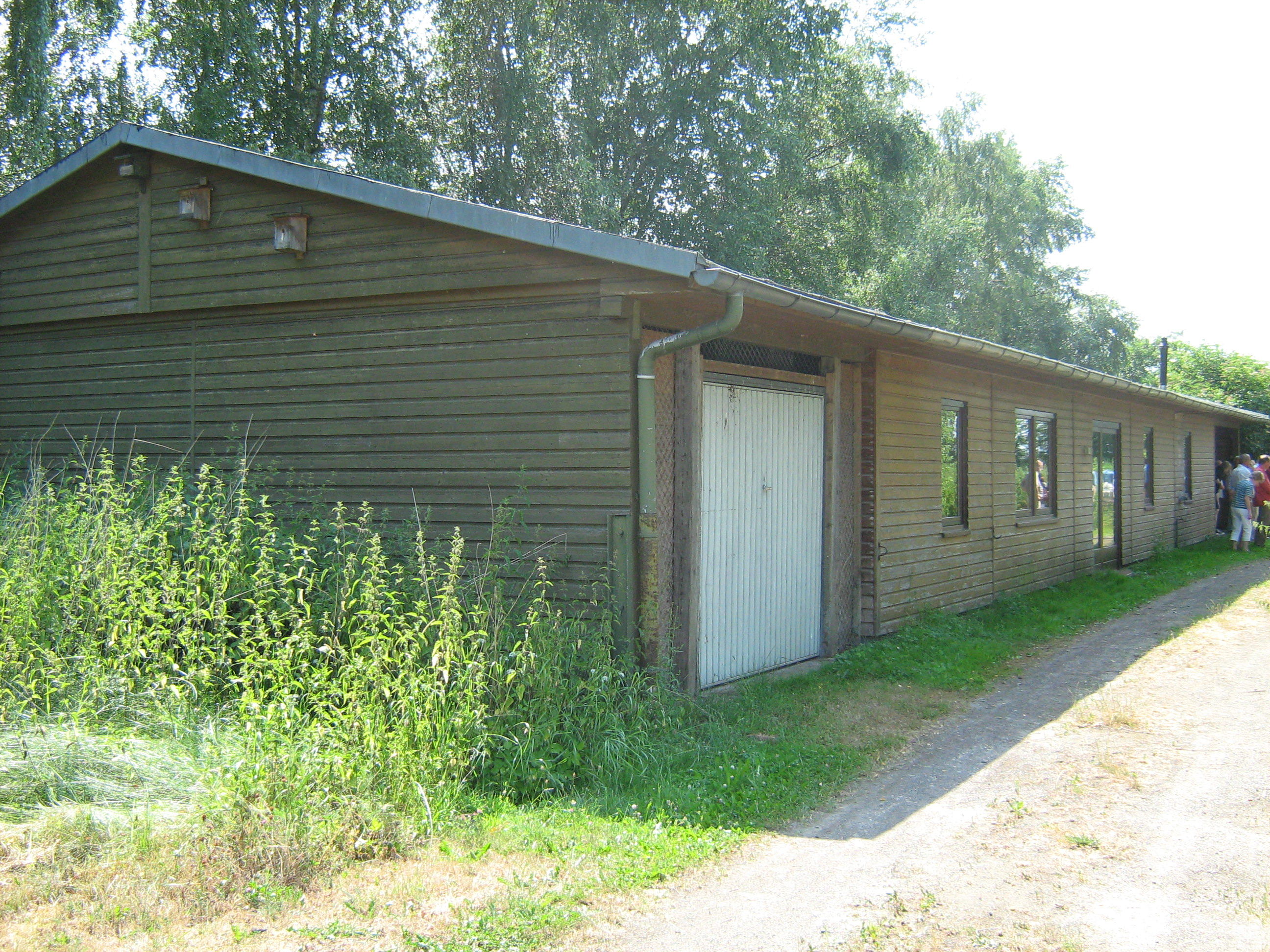 Freistatt-Deckertau im Jahr 2010 (ehemalige Wohn- Barrake)